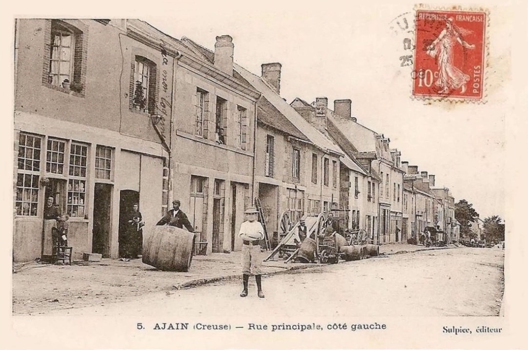 La Grande Rue en 1909